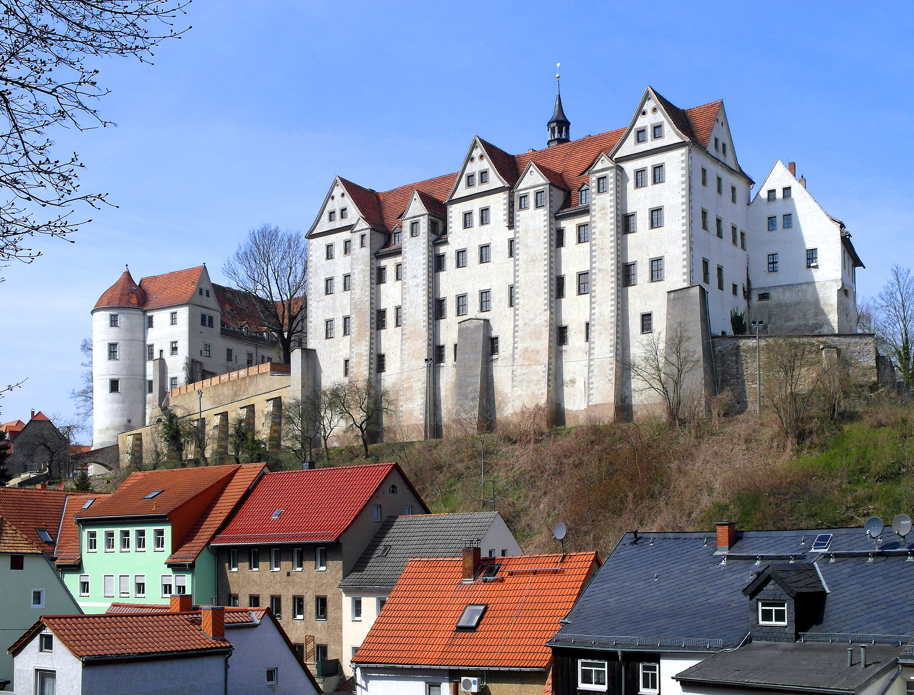 14.04.2015 01683 Nossen: Blick vom Rodigt Berg aus Südosten zum Schloß. [SAM9789.JPG]20150414670DR.JPG(c)Blobelt